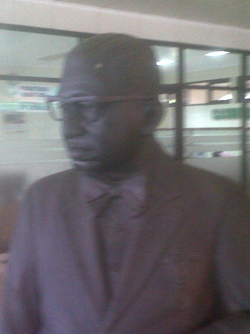 Patung Dr.Oen yang ada di lobi rumah sakit Dr.Oen Kandang Sapi